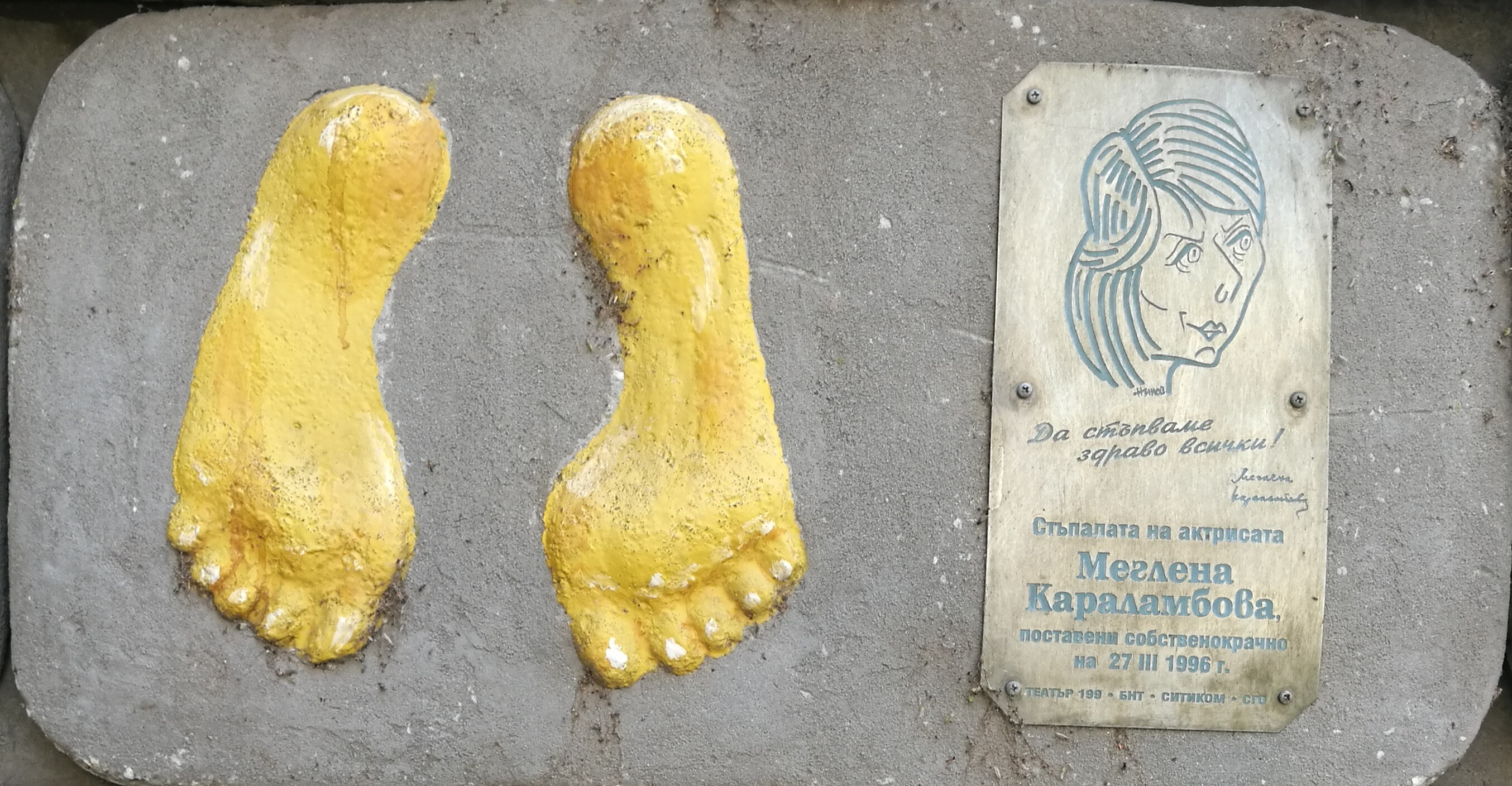 Стената на славата пред Театър 199 - пано с отпечатъци, послание и шарж на Меглена Караламбова.